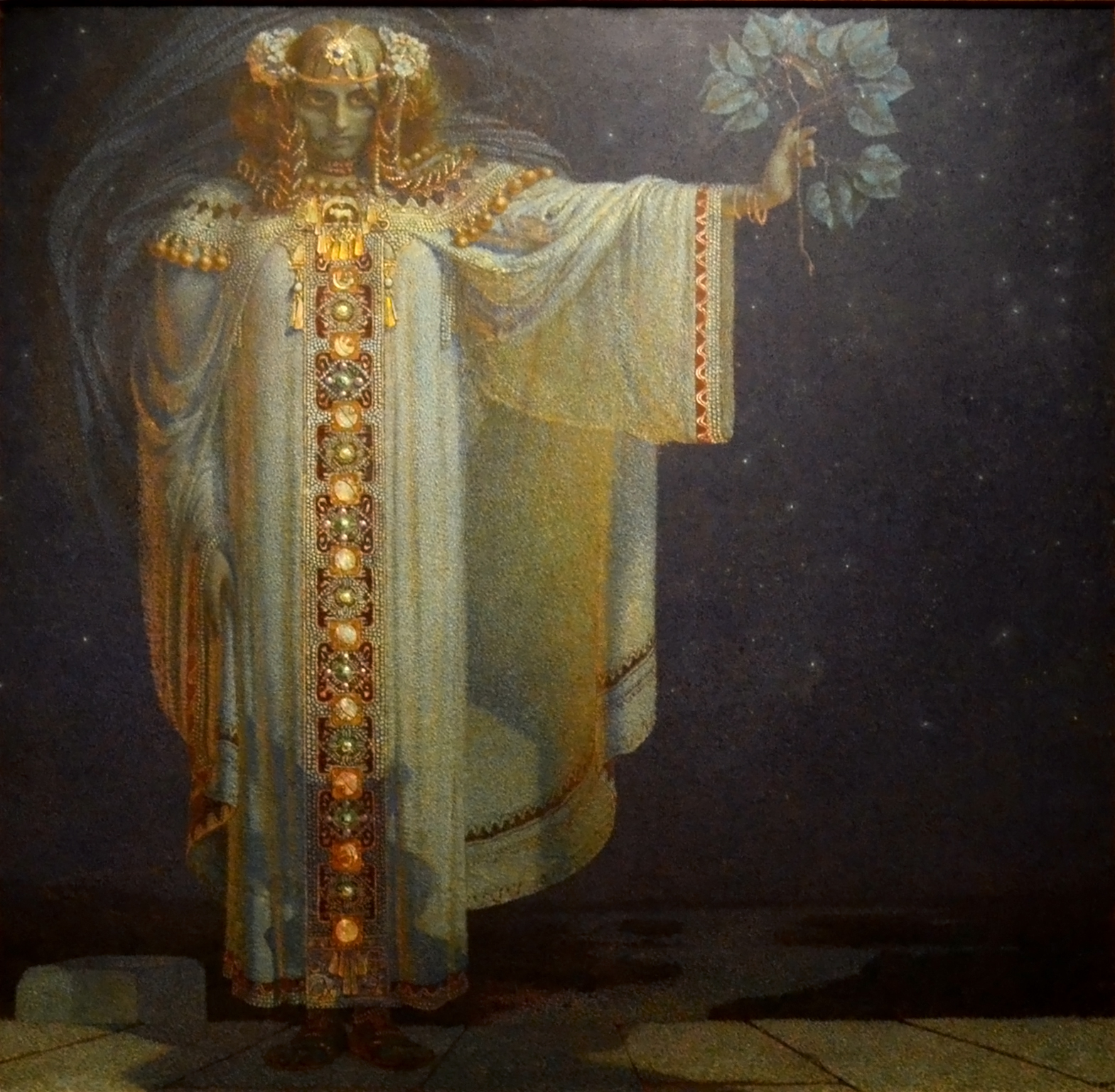 Портрет чешской принцессы-предсказательницы Либуше